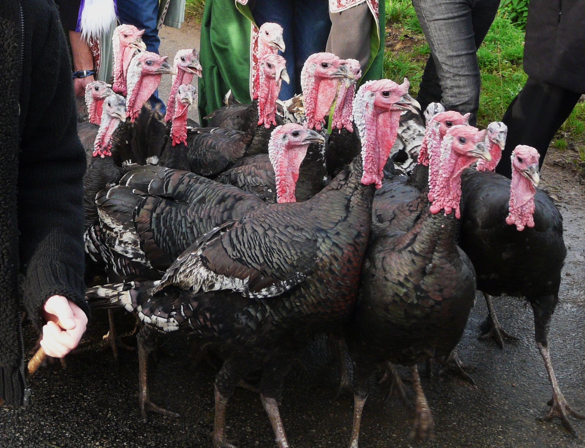 Le défilé des dindons, foire aux dindons, Varaignes, Dordogne, France